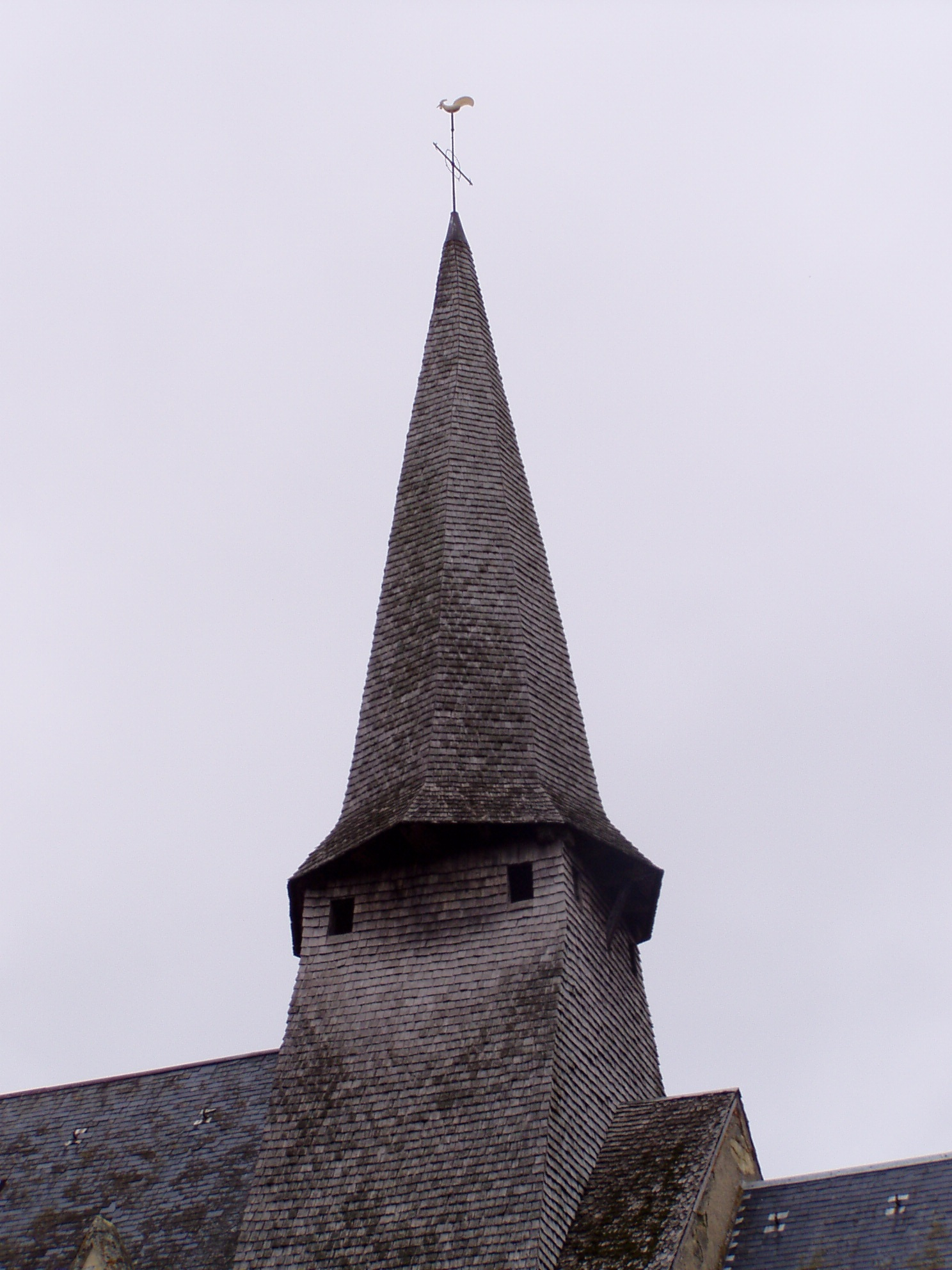 Photographie du clocher tors de l'église Saint-Martin de Nohant-en-Graçay dans le Cher prise par Accrochoc le 04 septembre 2006